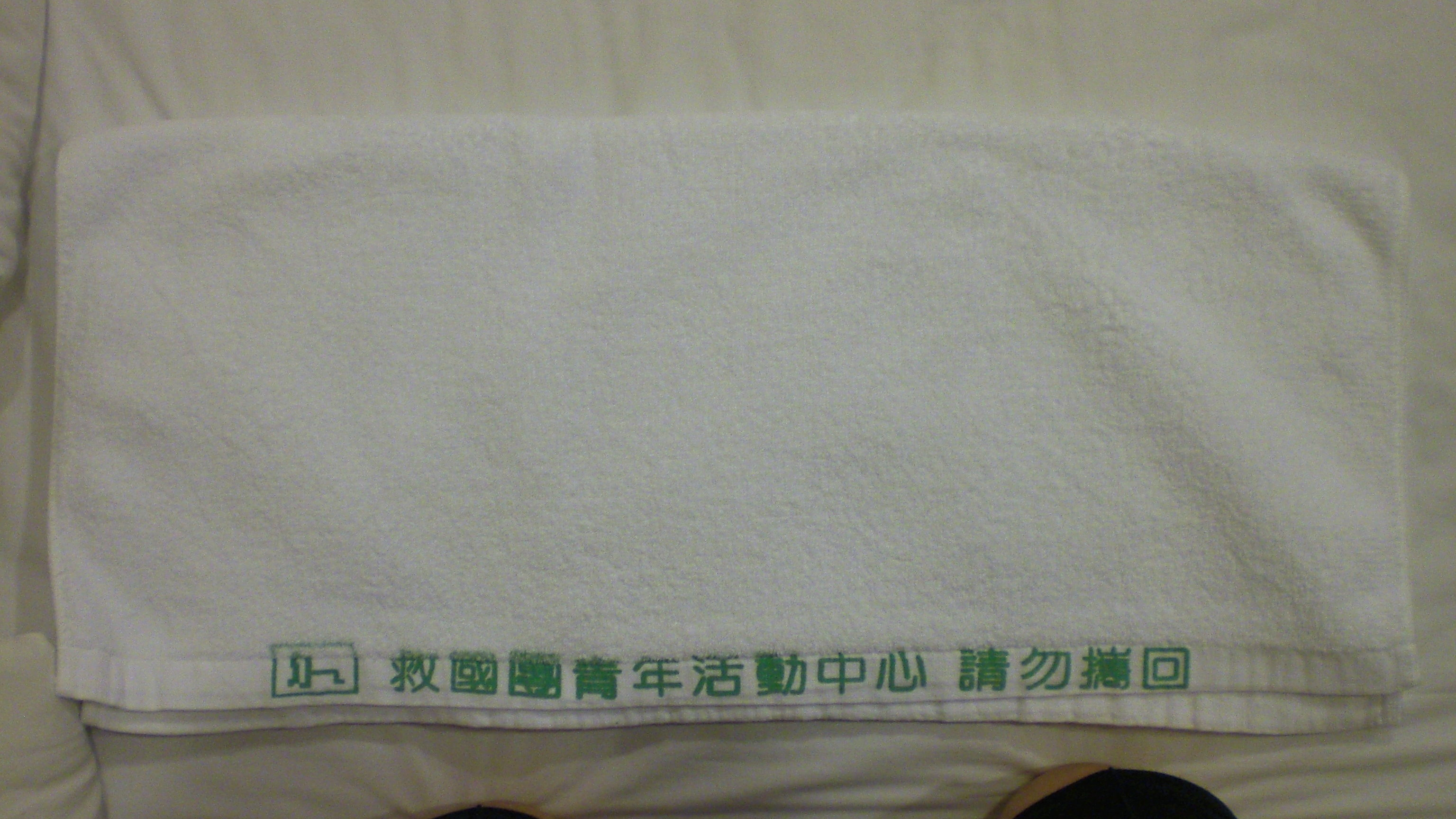 中國青年救國團墾丁青年活動中心客房毛巾